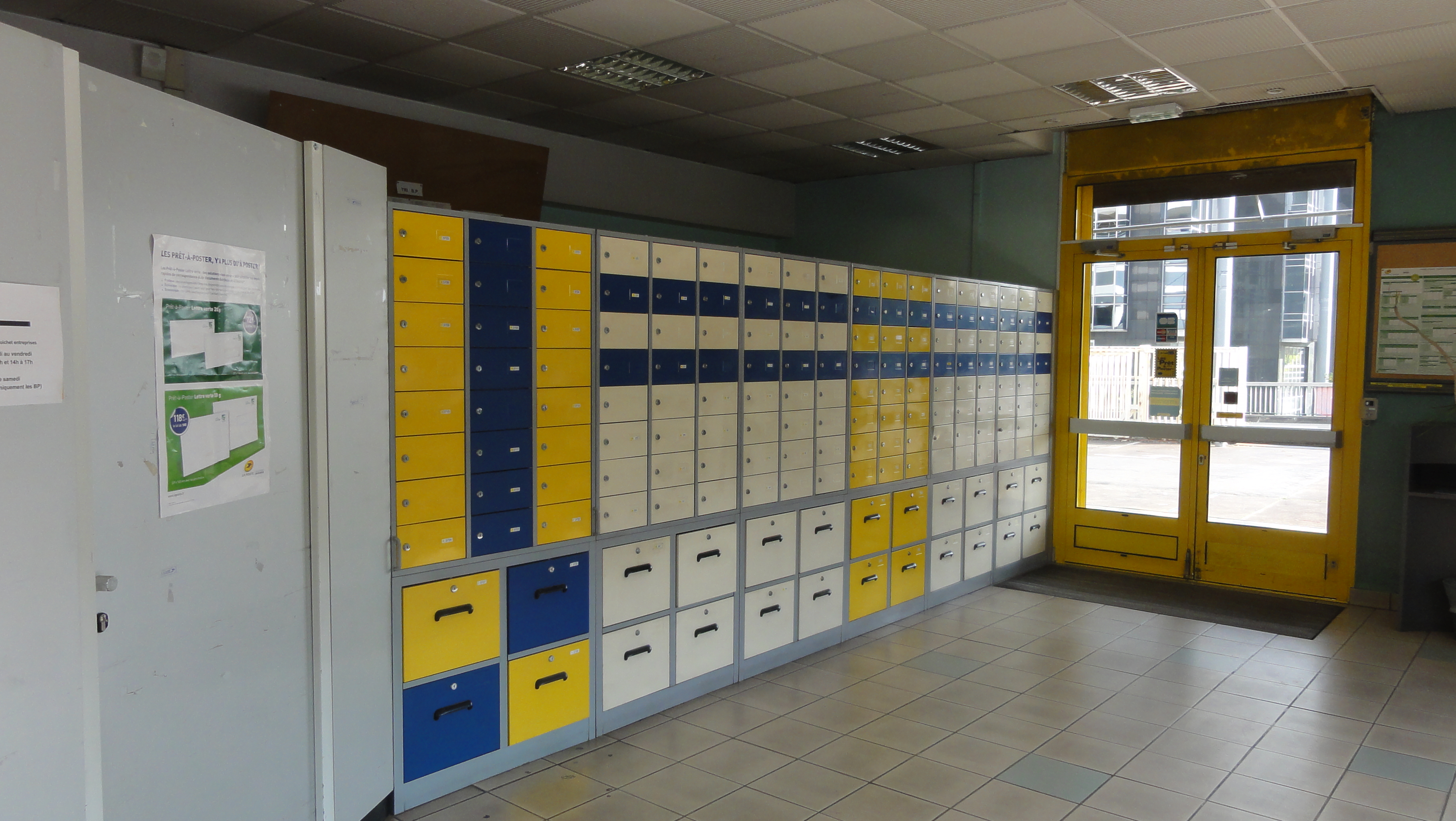 boites postales